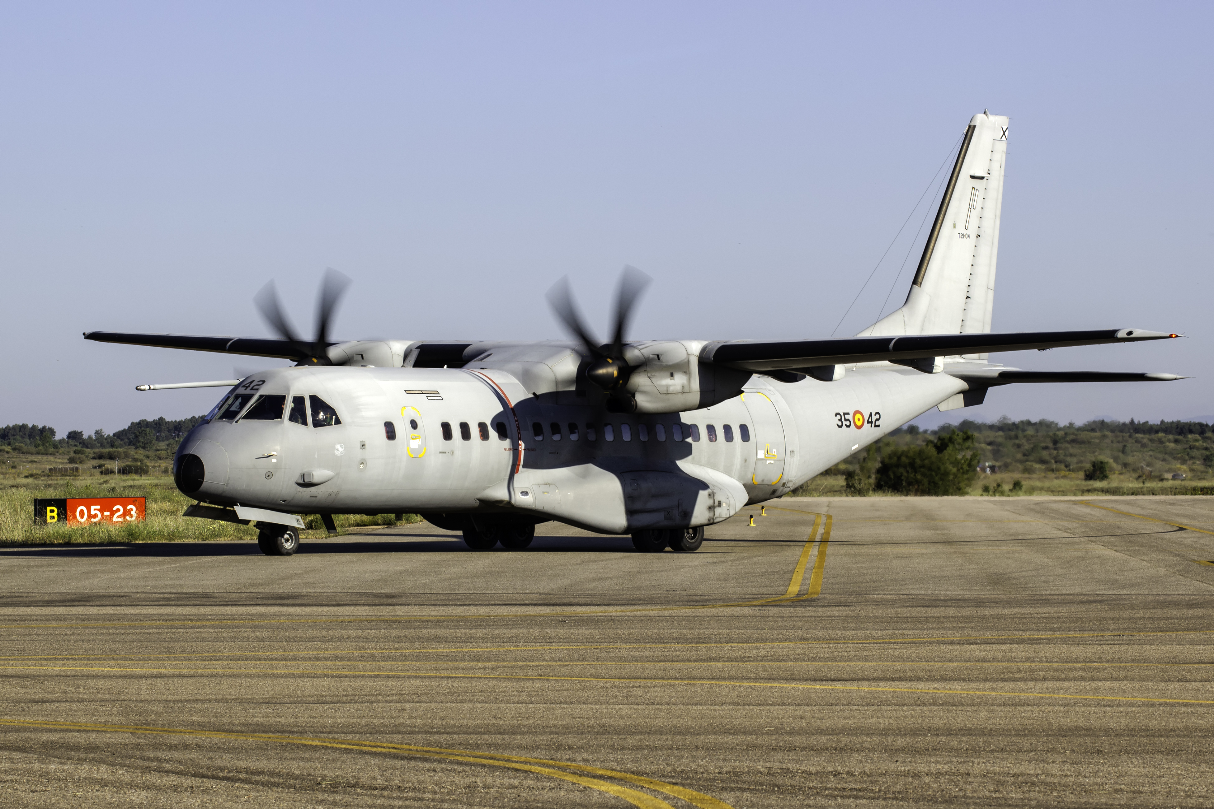 CASA C-295 do Exército do Aire español nos actos polo 25 aniversario da Academia Básica do Aire de León.